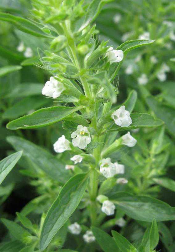 Lallemantia iberica, Ölziest